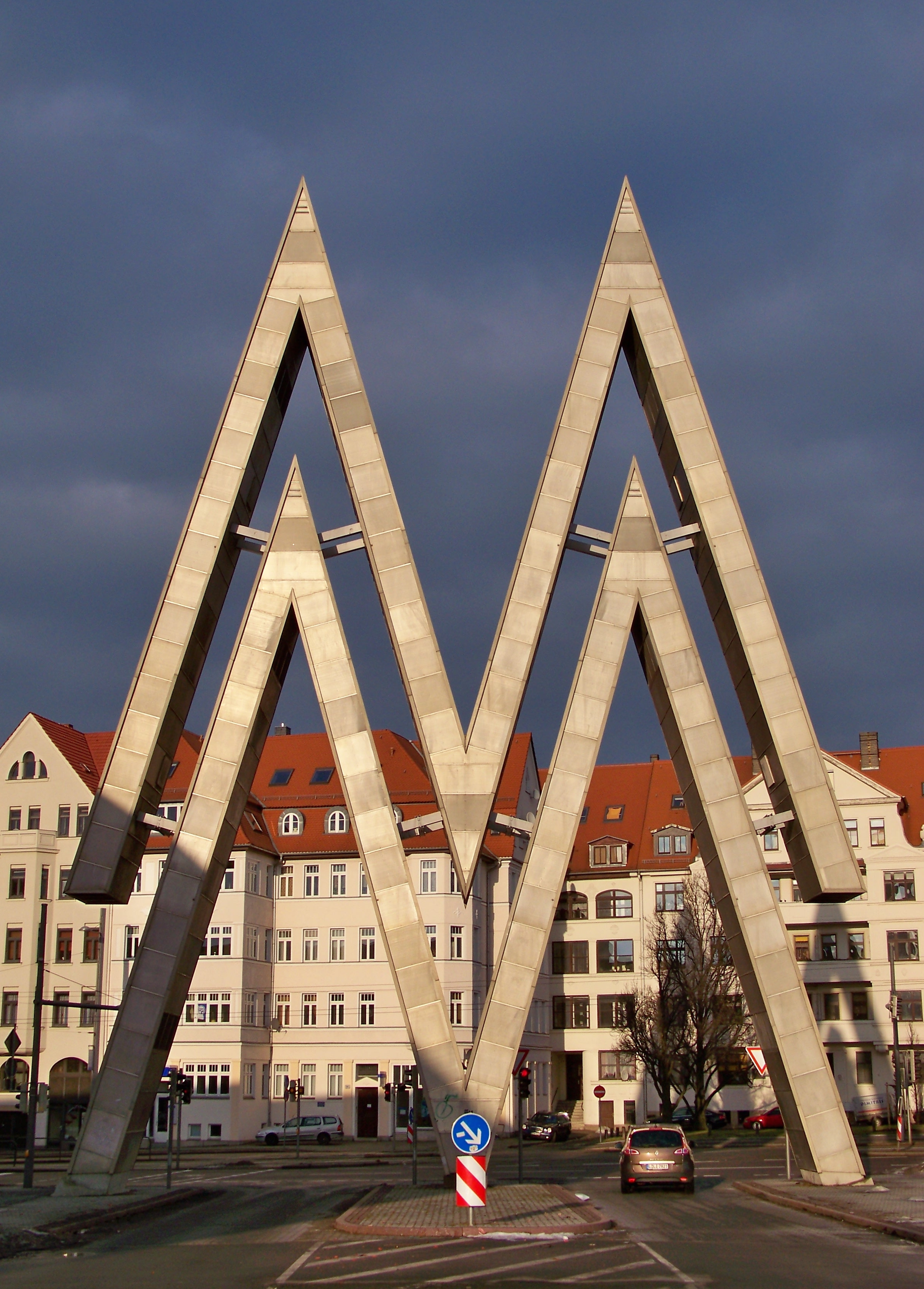 Doppel-M als Markenzeichen der Leipziger Messe, am Nordtor des Alten Messegeländes an der Prager Straße